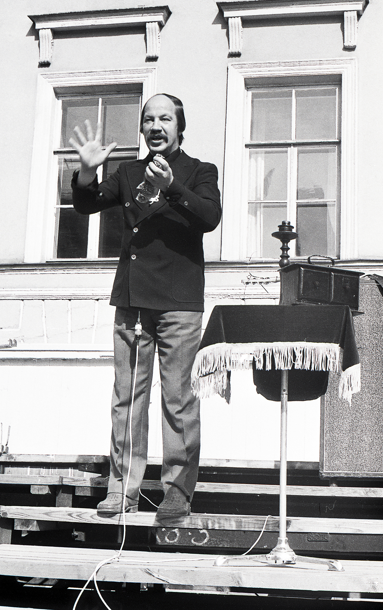 Tõnu Ojavee, illusionist vanalinna päevadel 84